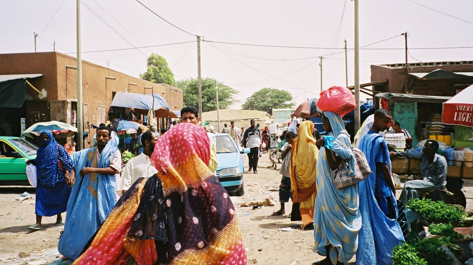 Marche de Nouakchott - A cote du marche couvert